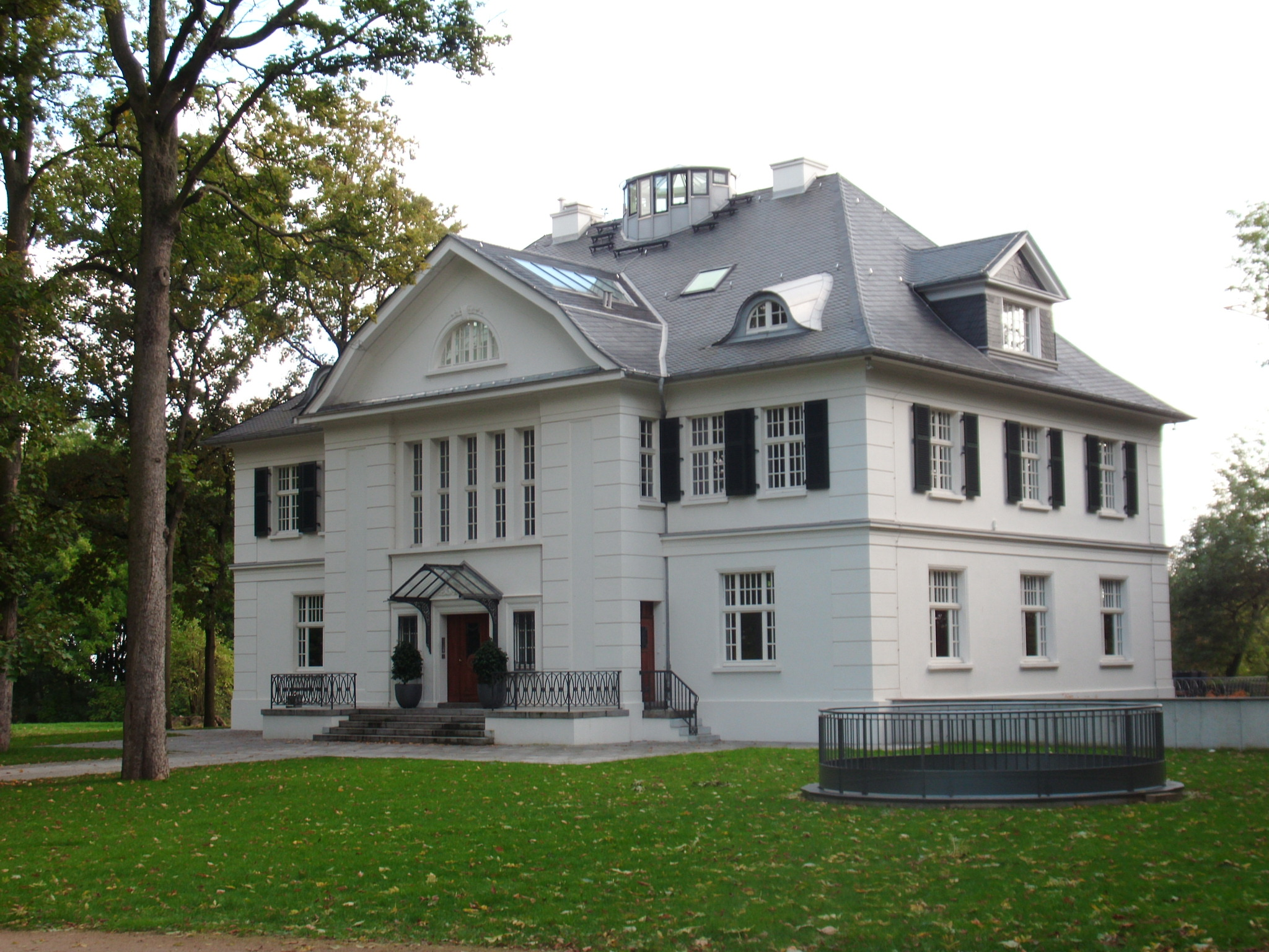 Villa samt zuführender baumbestandener Wegeführung.This is a photograph of an architectural monument.